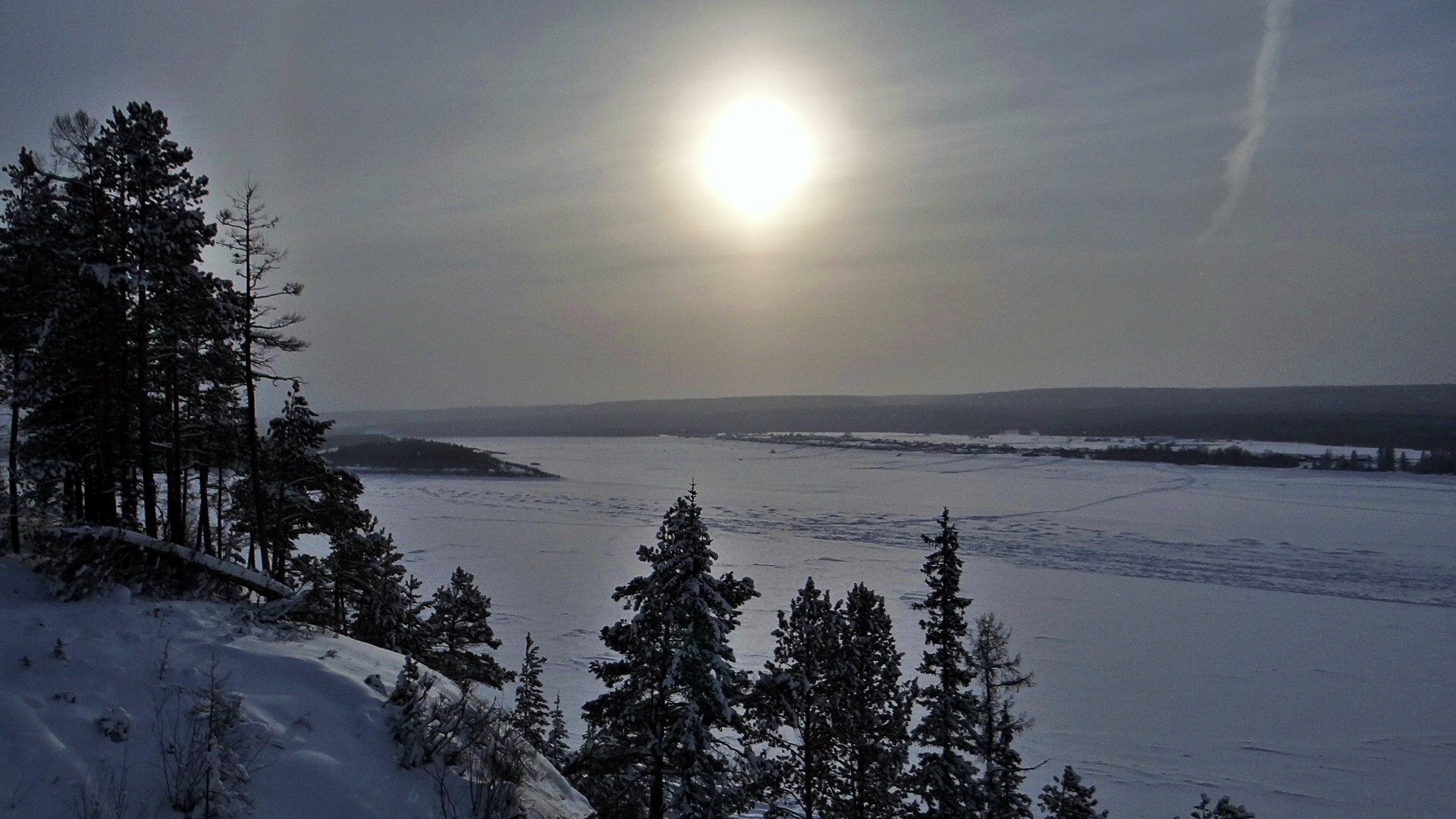 Олекминский заповедник, Олёкминский район This image is related to the protected area of Russia number 1400190